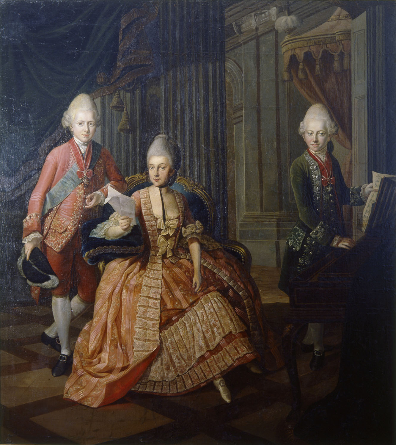 Anna Amalia von Braunschweig-Wolfenbüttel mit ihren beiden Söhnen